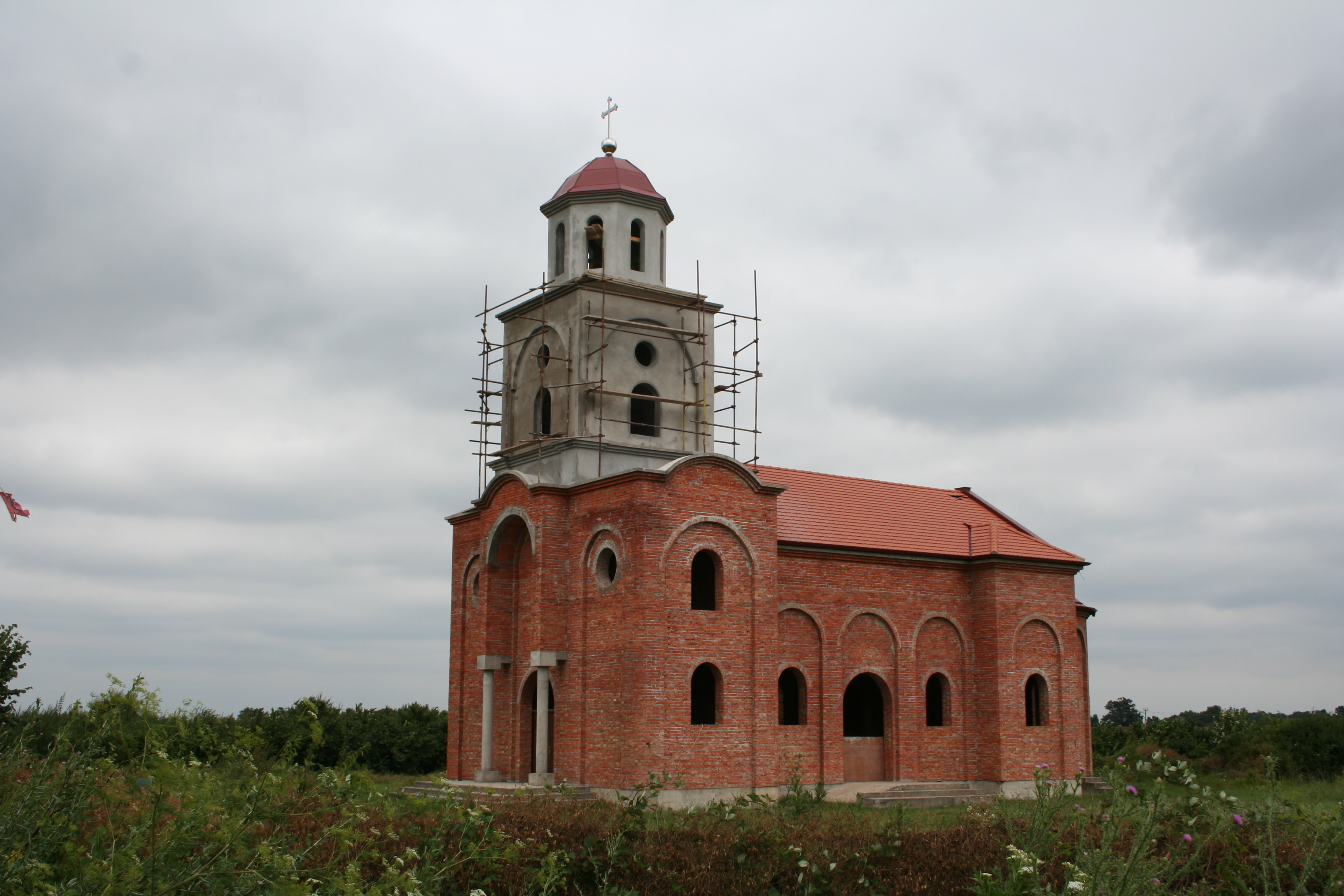 Pravoslavna crkva u izgradnji, Gornja Vranjska